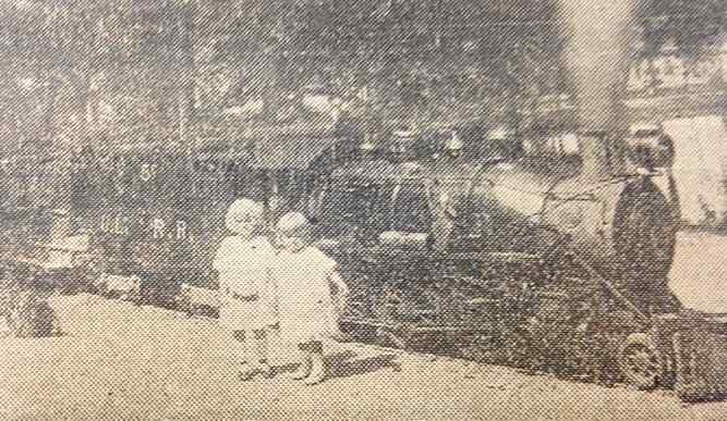 ‘Buddy’ Courcy was ‘president’ of miniature Urbita Lake railway in 1915.